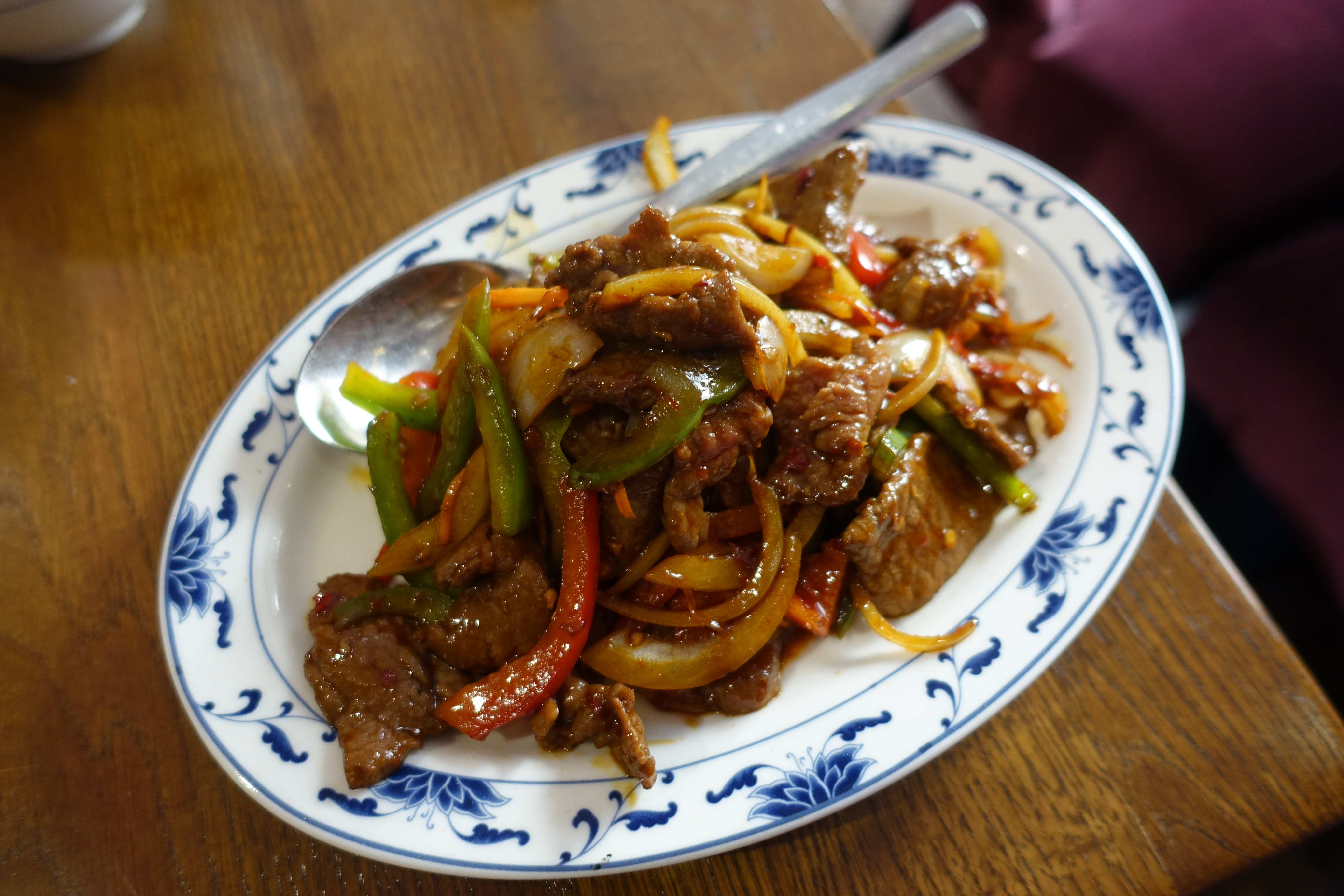 Beef in Spicy Sauce @ Cité Impériale @ Paris